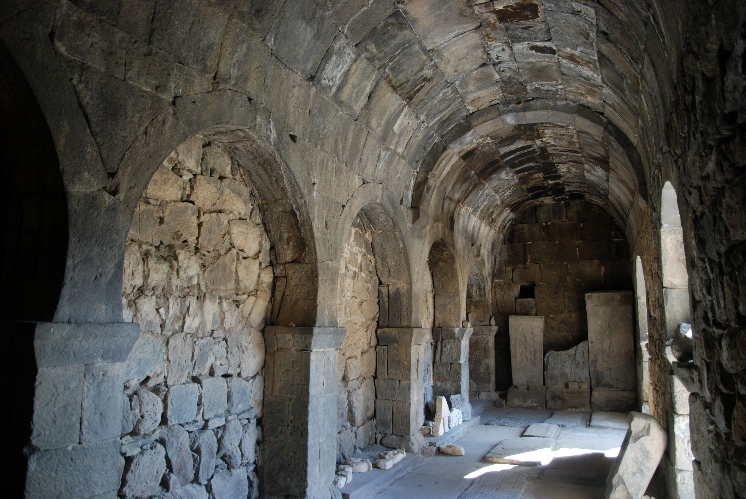 Vorotnavank, portico Surp Stephanos